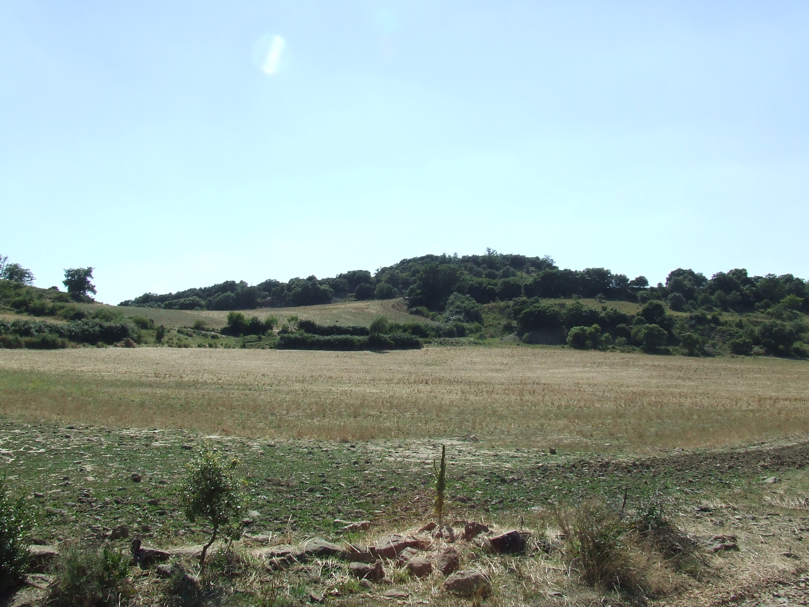 El Planell de Sallamana (el Meüll, Mur, Castell de Mur, Pallars Jussà)